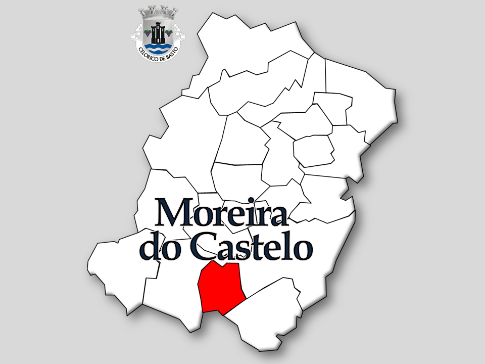 Censos 1864/2011